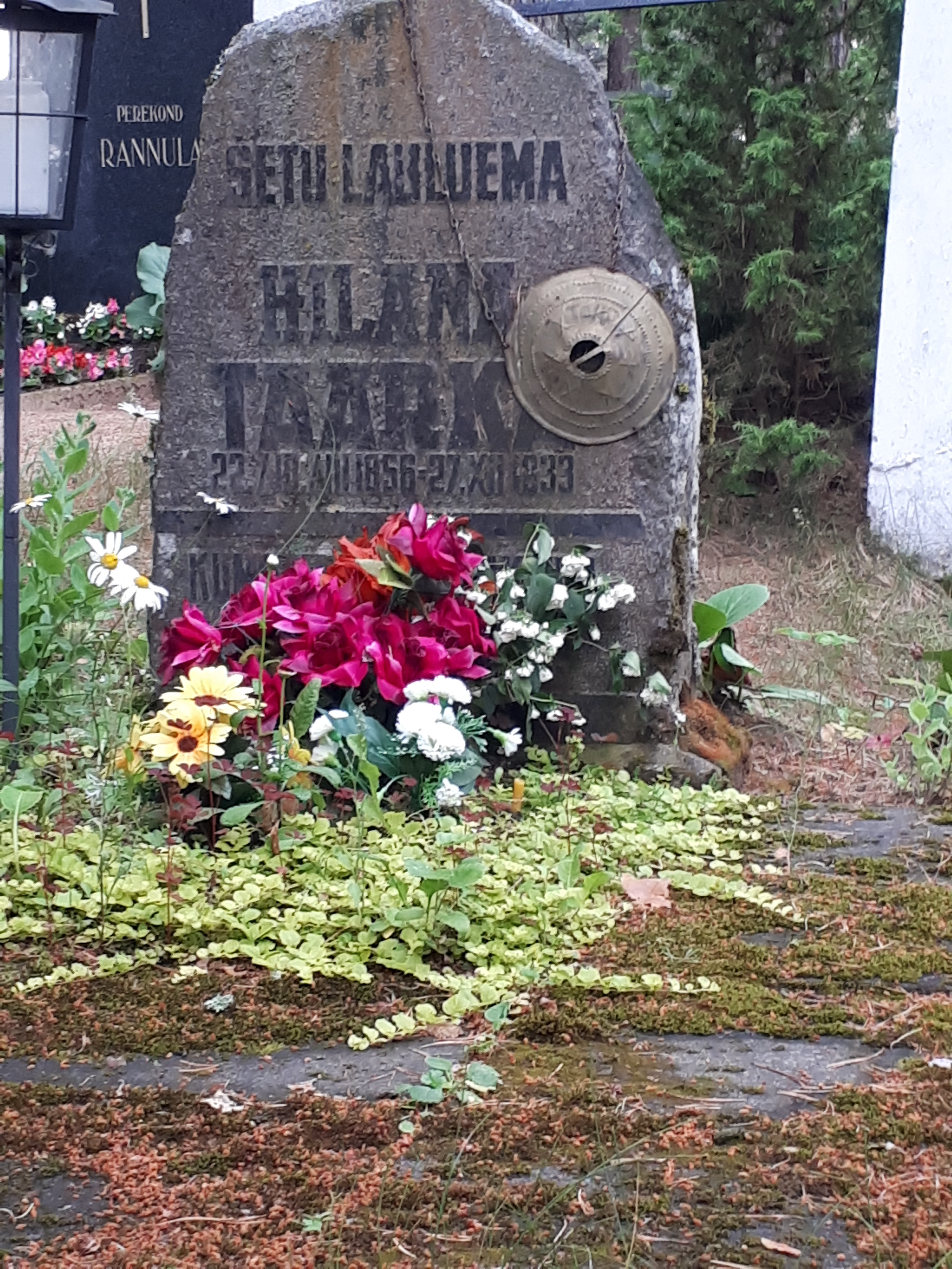 Grób poetki setuskiej Hilany Taarki, cmentarz w Obinitsa, Estonia.